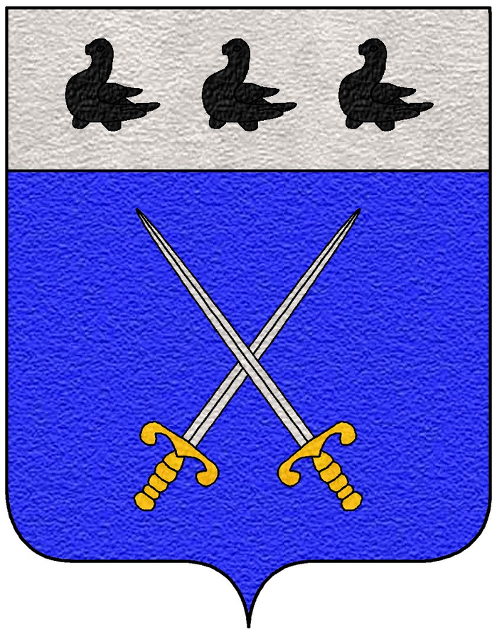 Blason de la famille Prudhomme de La Boussinière